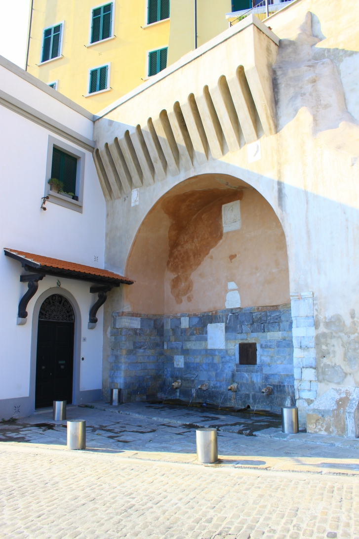 Foto delle Fonti di Marina di Piombino — in the province of Livorno, Tuscany.